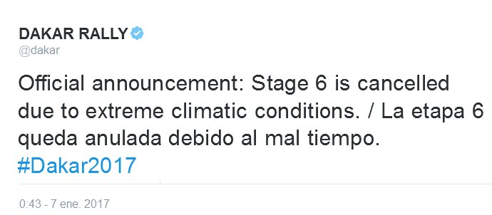 Twit de la organización del Rally Dakar 2017- Cancelando la Etapa 6 - 7-1-2017